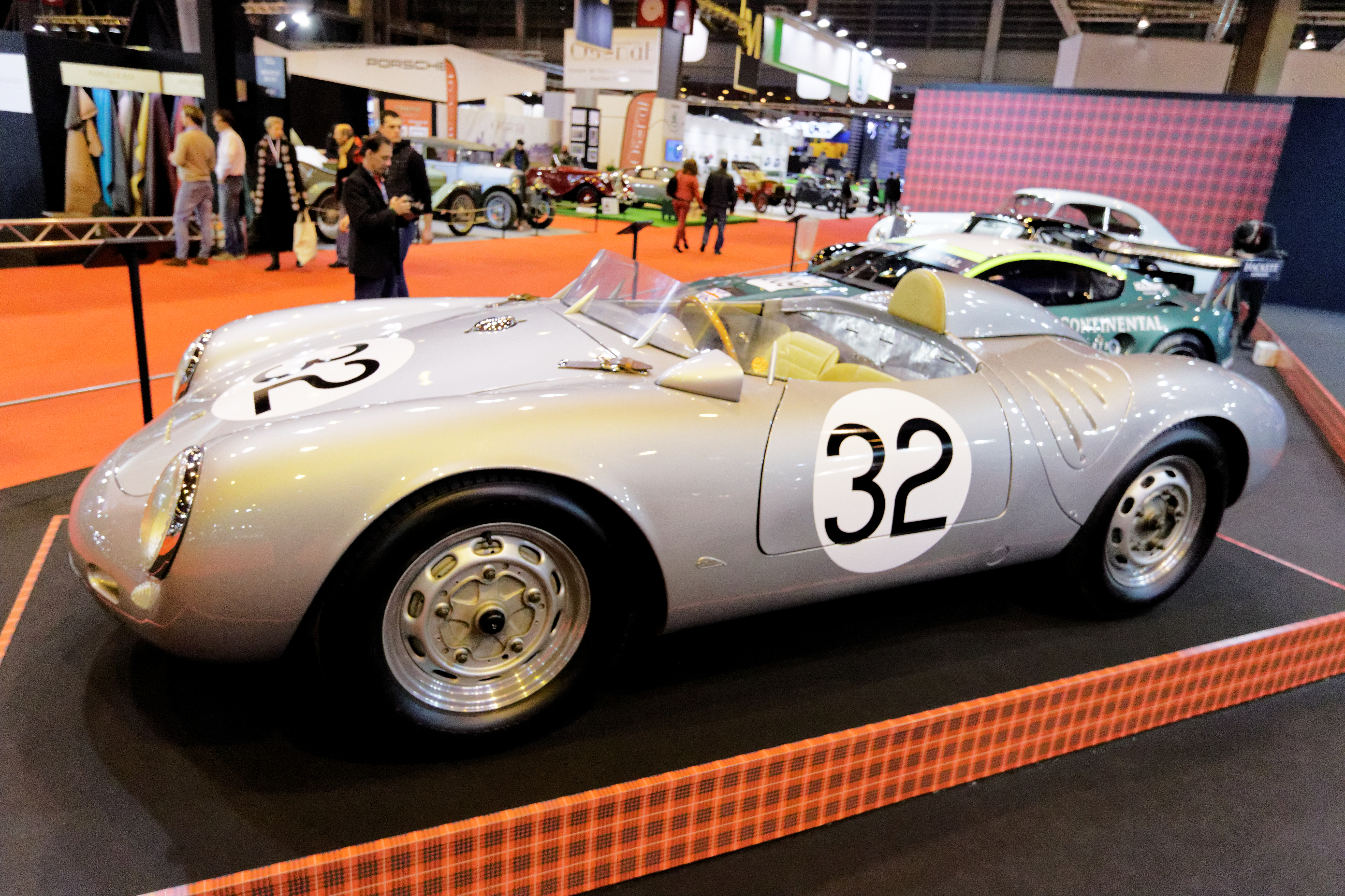 Une des voiture présentée lors du salon Rétromobile de Paris 2015